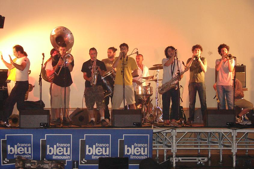 Les touffes kretiennes au Festival Bouge Ton Zinc des Monts de Châlus